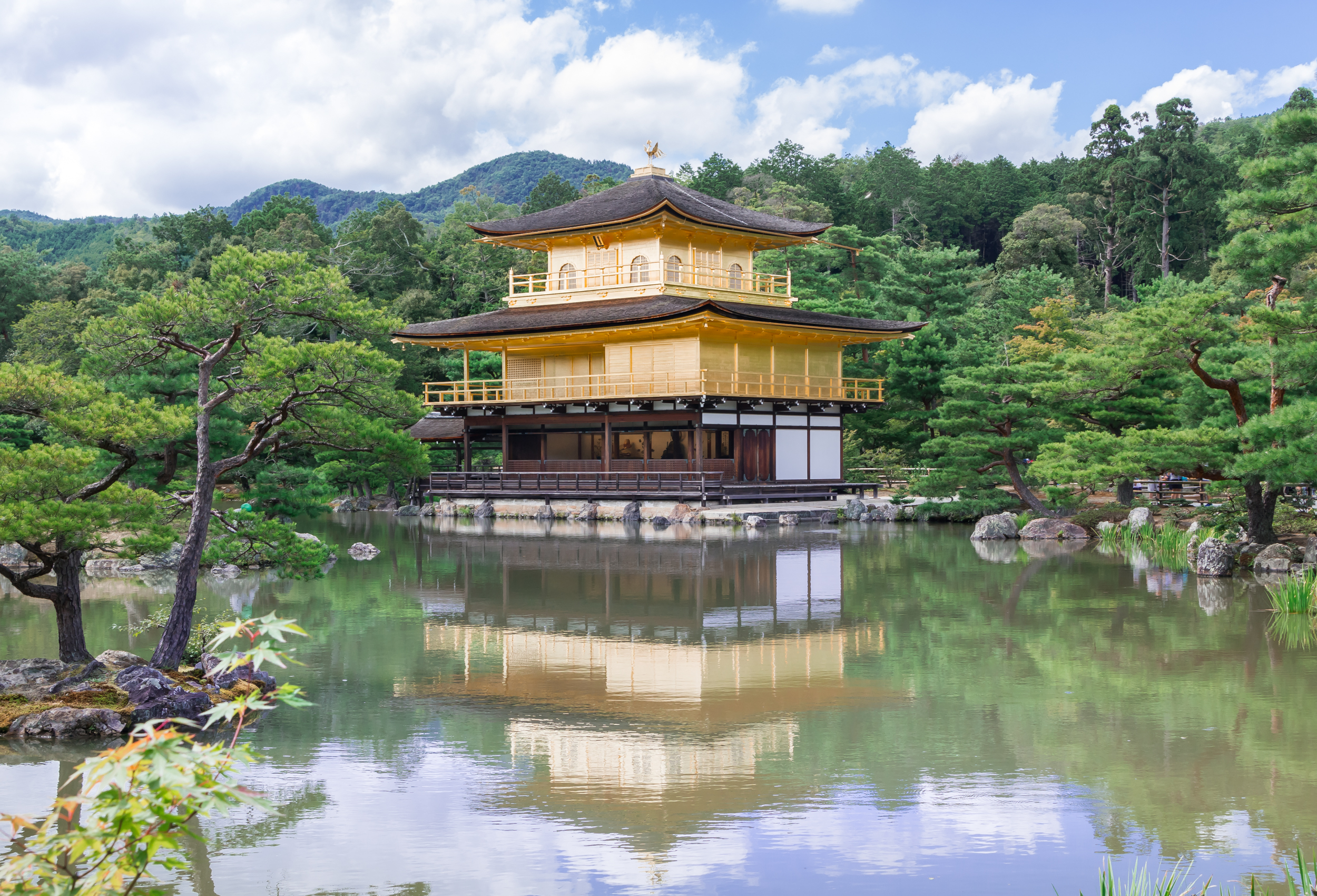 金閣寺-舎利殿